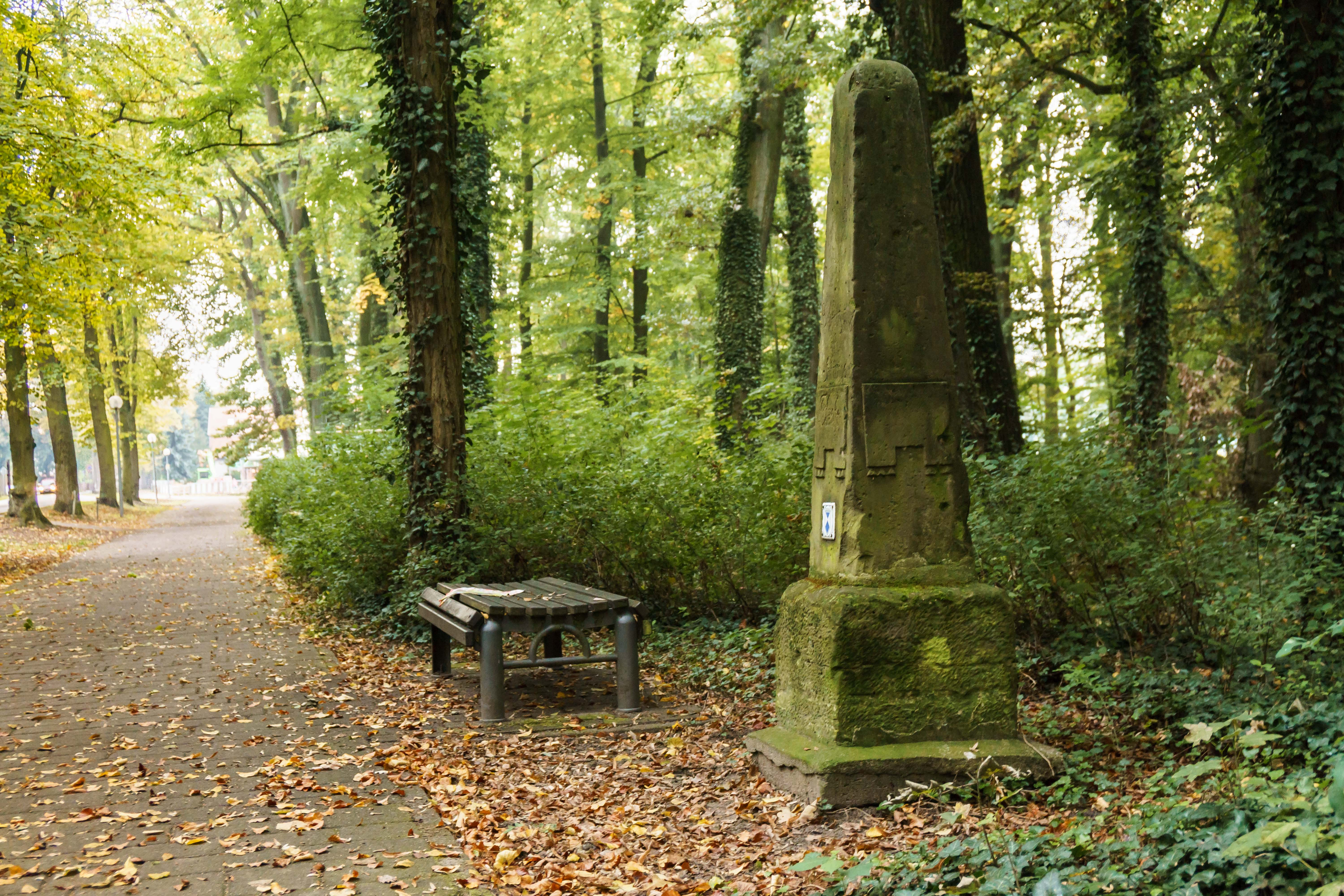 Preußischer Halbmeilenobelisk (0849) an der L 1, Lindenstraße in Arendsee.Text: Beschädigung ist Festungsstrafe